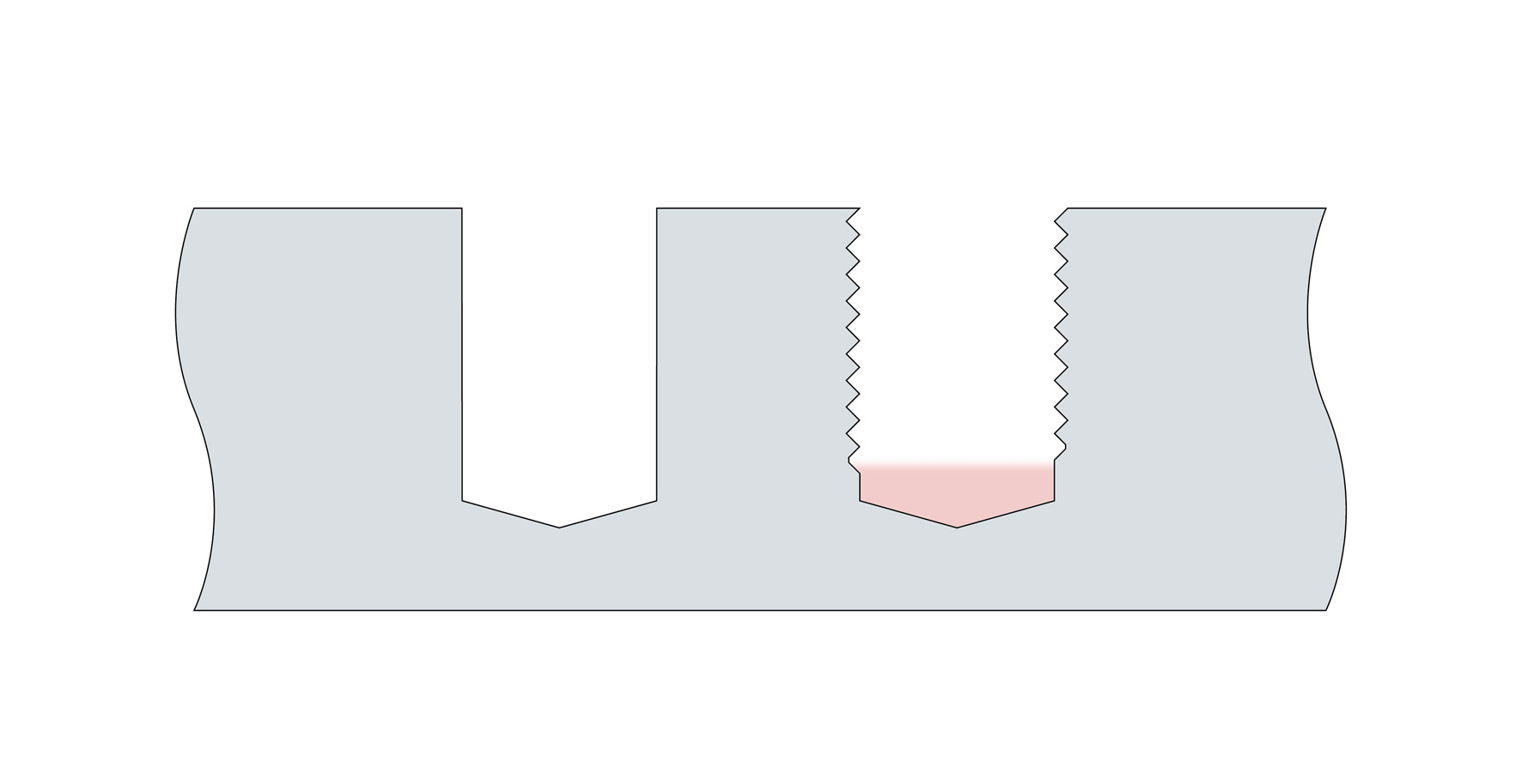 Sackloch (links einfaches Sackloch, rechts mit Gewinde und rot markiertem Grundloch